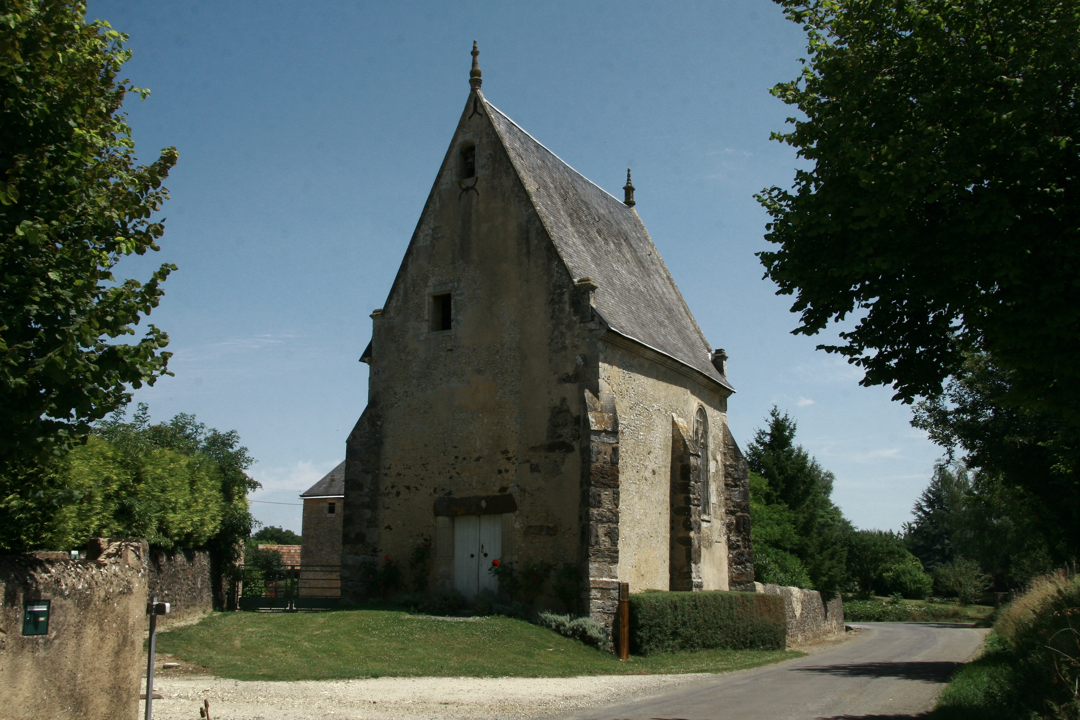 Chapelle Notre Dame de l'Habit, Domfront-en-Champagne, Sarthe, France